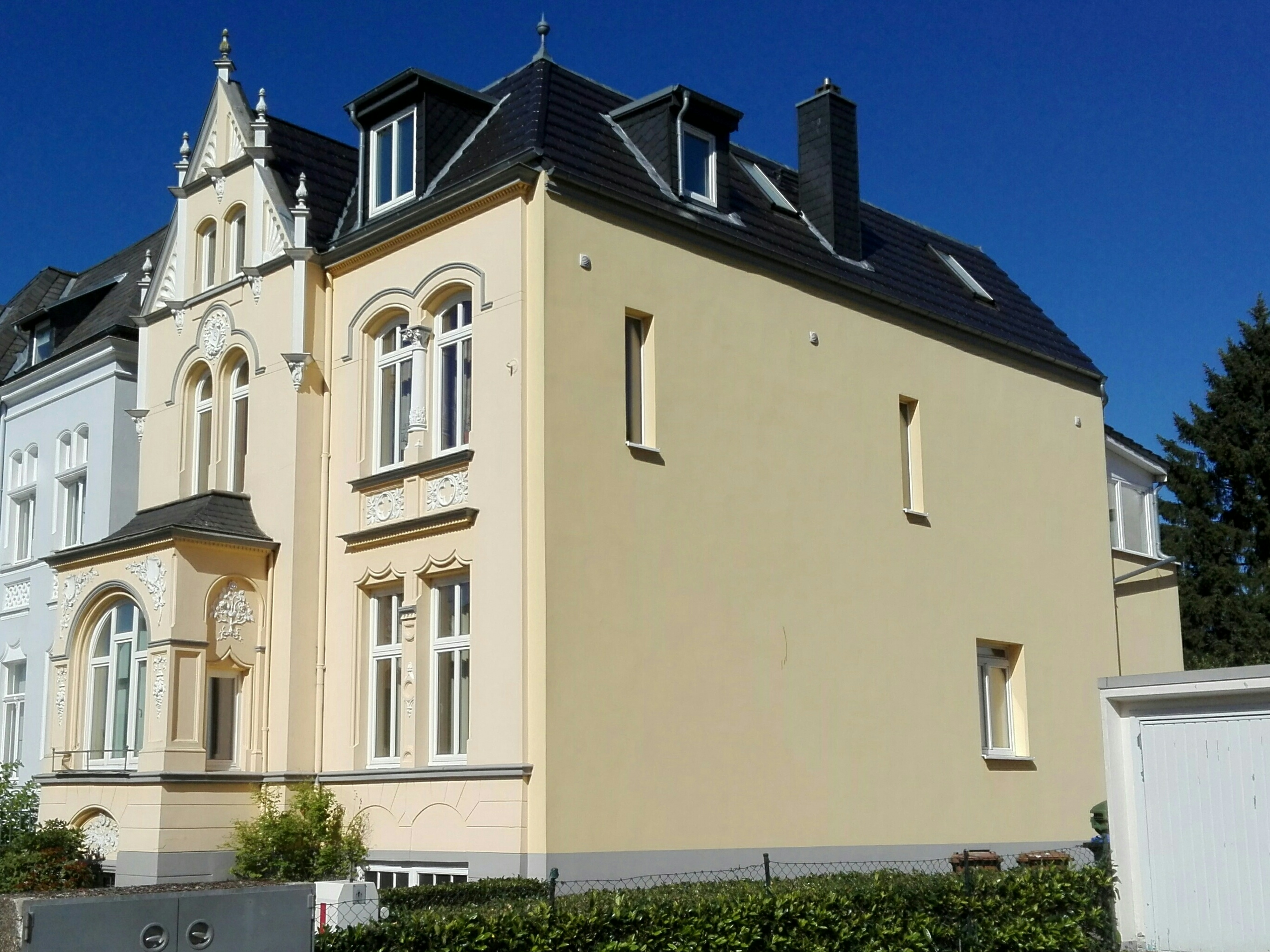 ehem. Wohnsitz von Prof. Dr. Ohnesorge bis 1919 in der Cronsforder Allee 33.